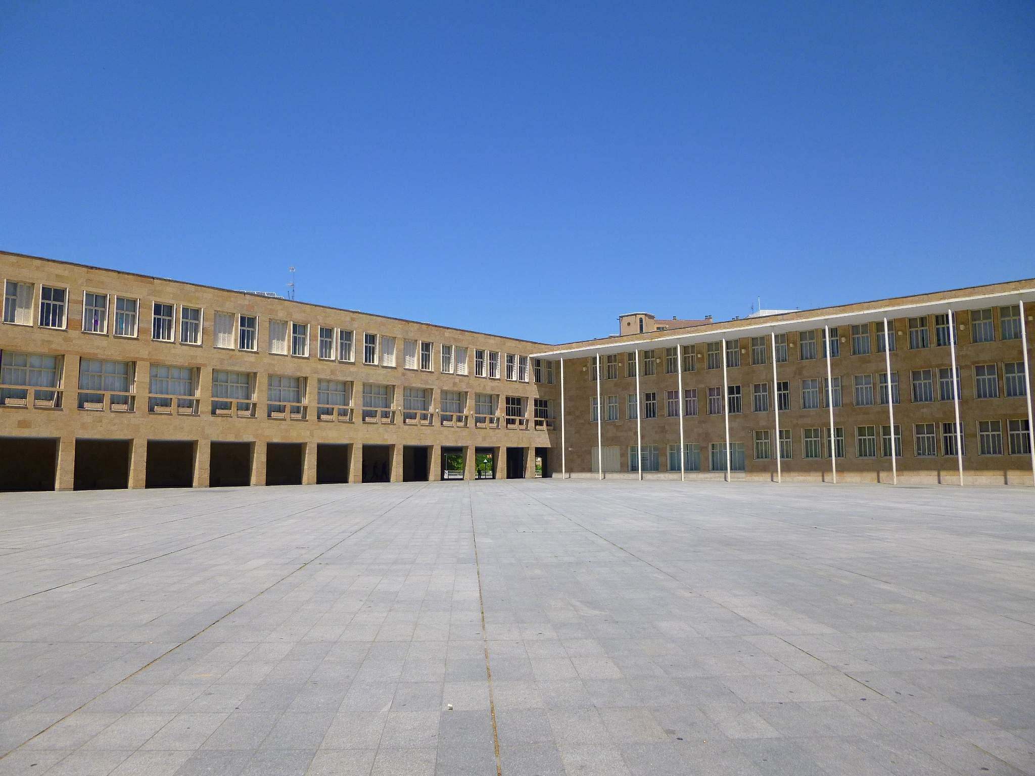 Ayuntamiento de Logroño